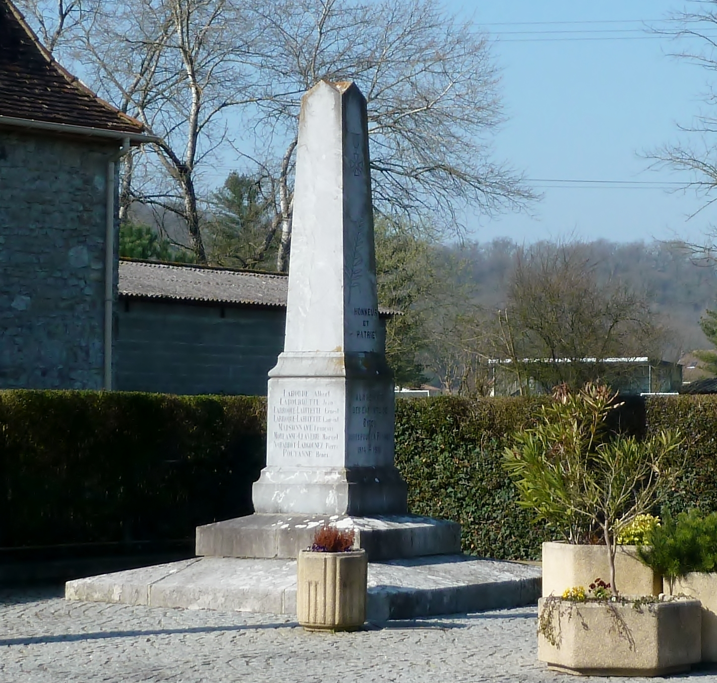 Monument aux morts de Biron (Pyrénées-Atlantiques)